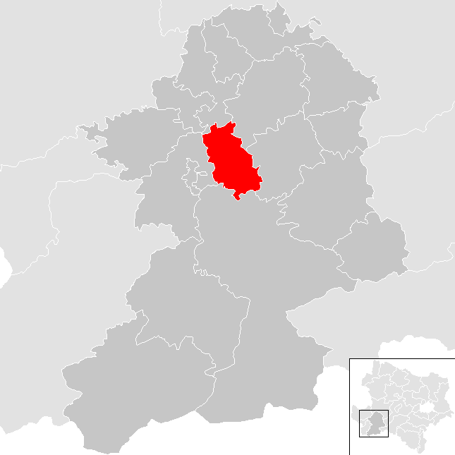 Bezirk Scheibbs